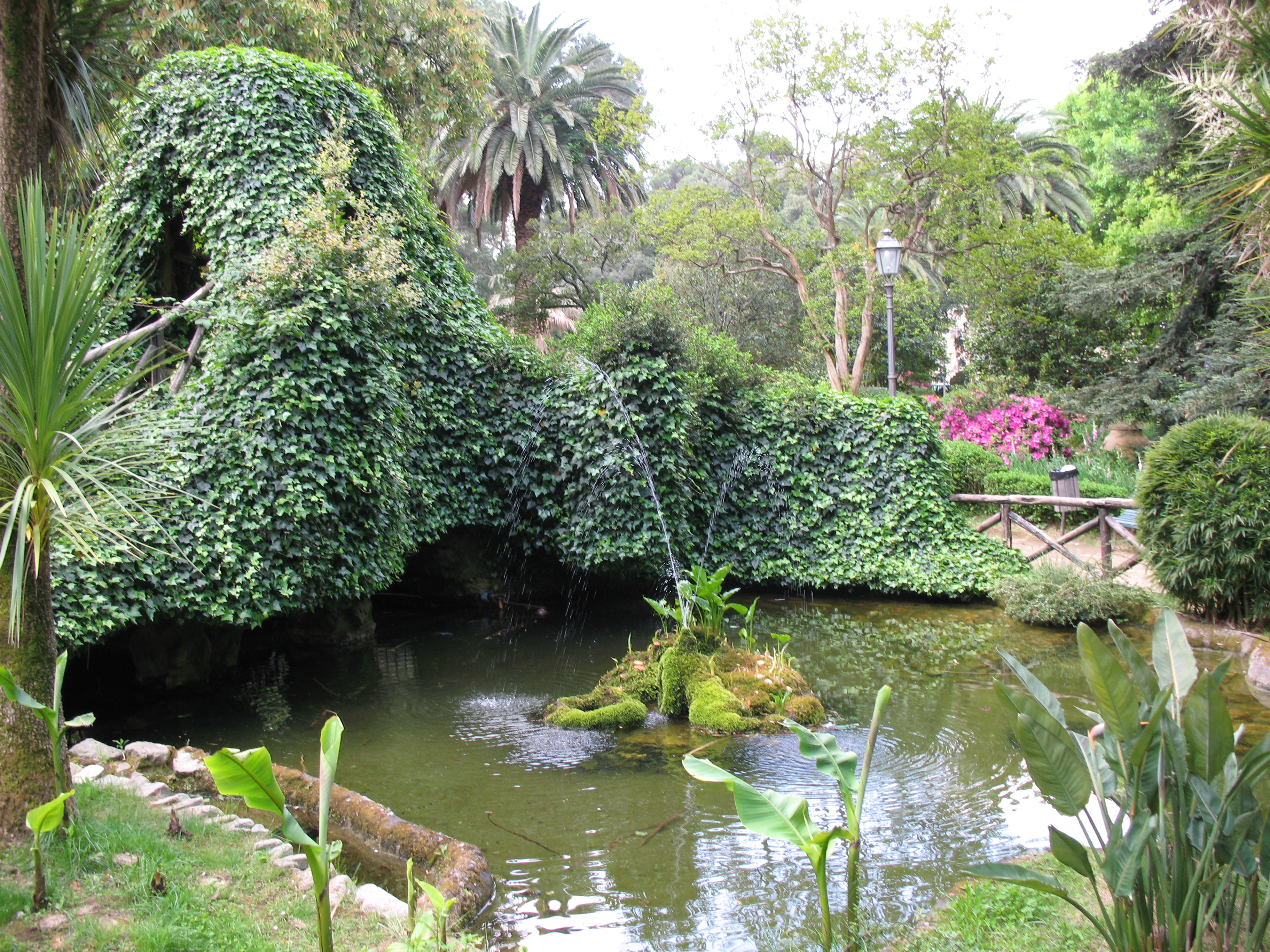 Foto della villa comunale di Cittanova (RC), Italy